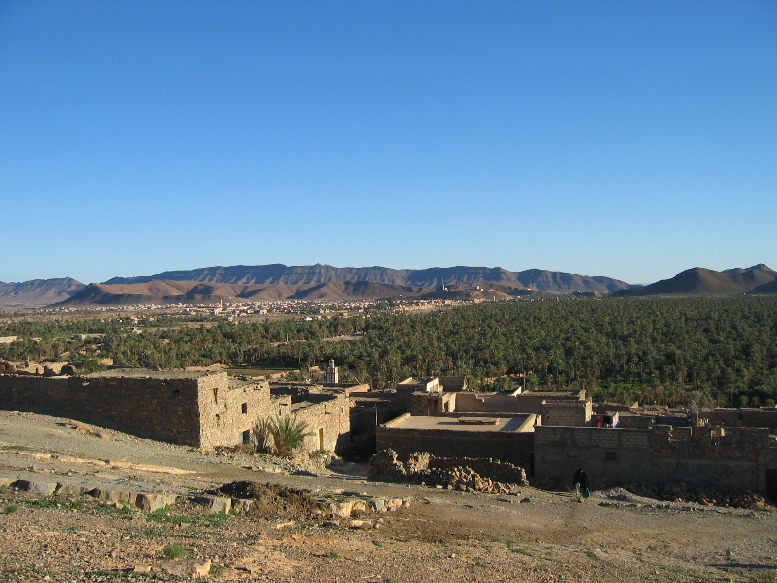 Palmeraie de Tata